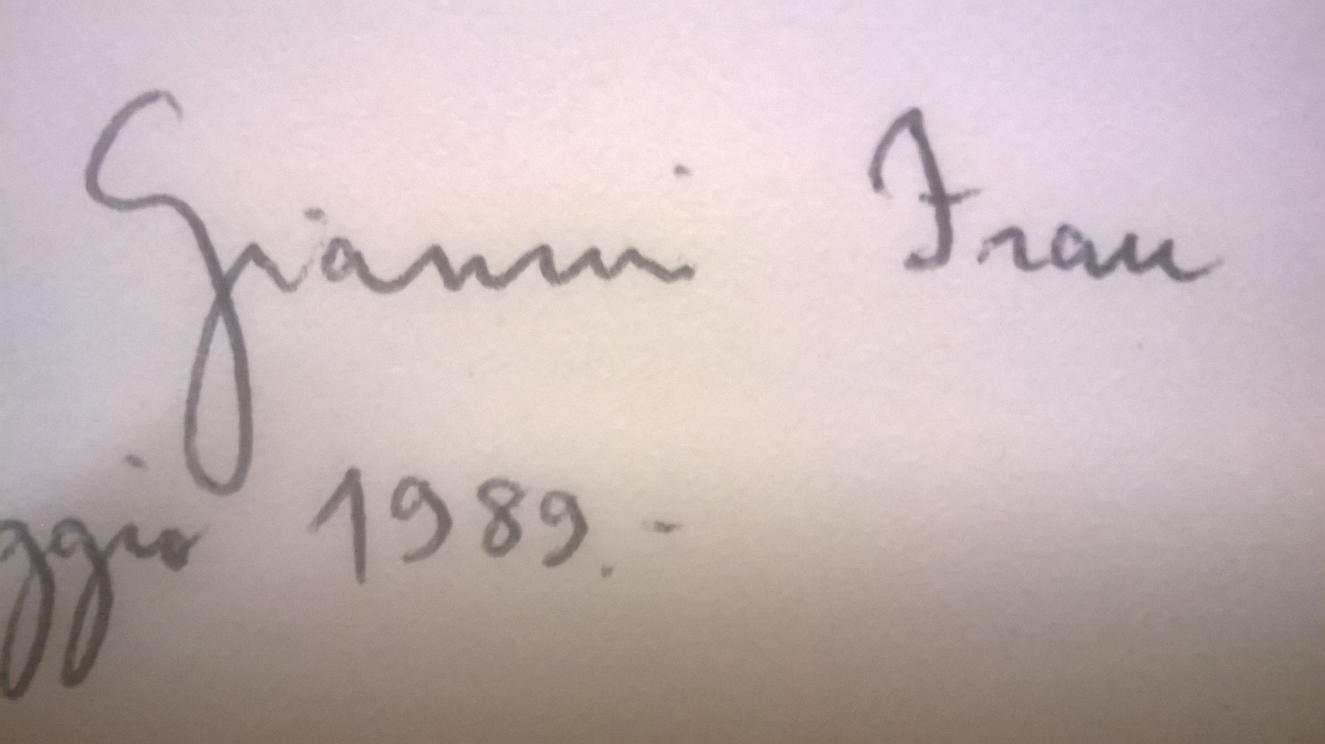 La firma di Giovanni Frau